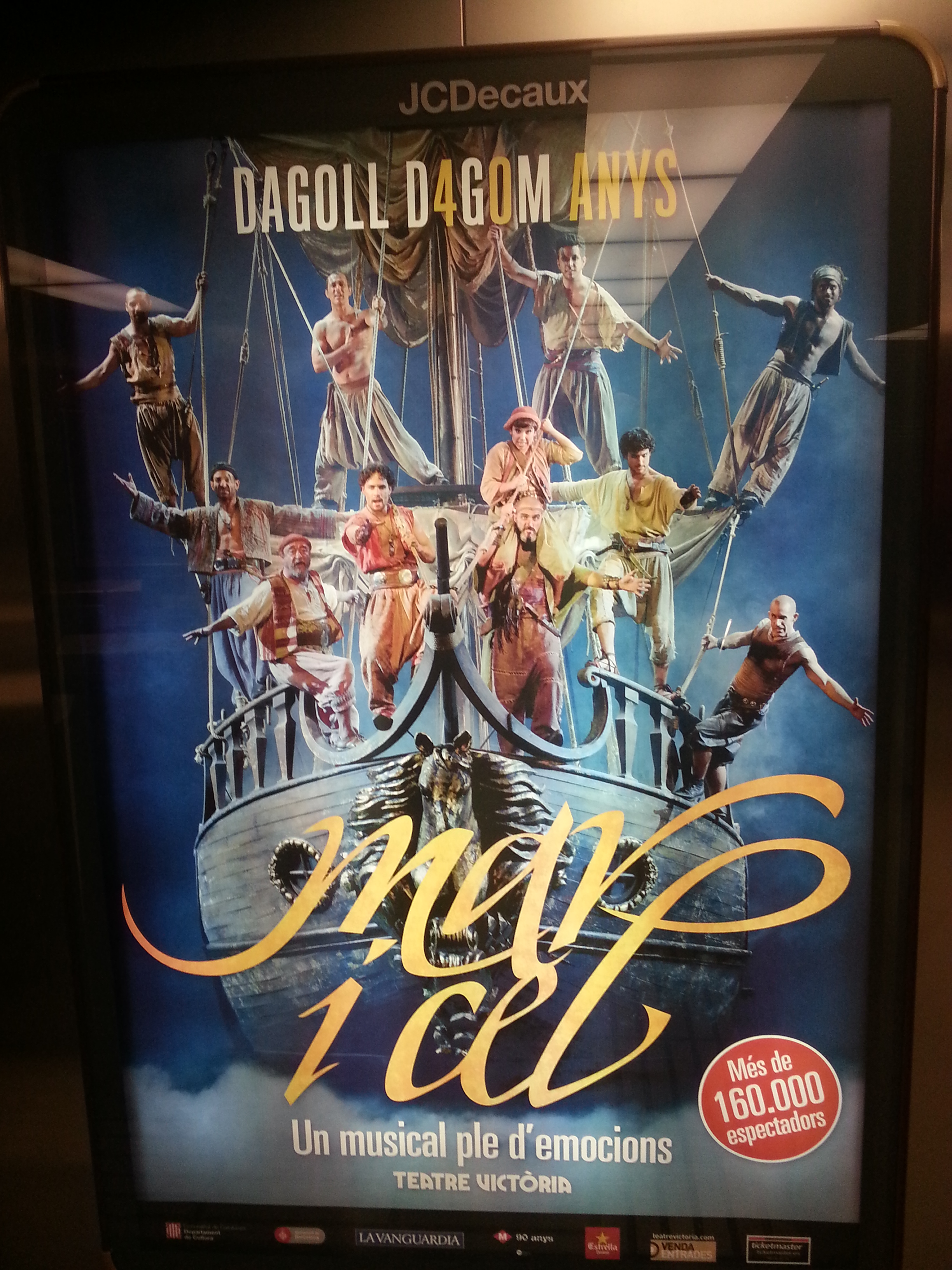 cartell de "Mar i Cel" al metro de Barcelona